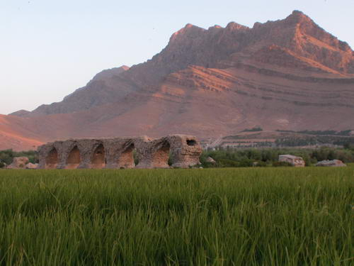 پل شاپوری ، جنوب خرم آباد ، دوره ساسانیان